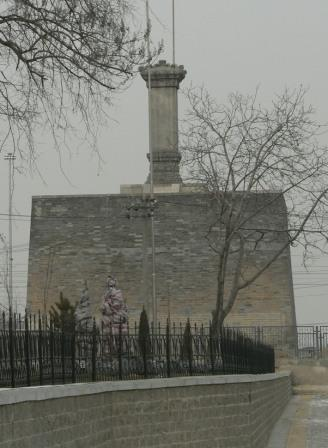 燕墩 2005年2月8日拍摄于永定门外